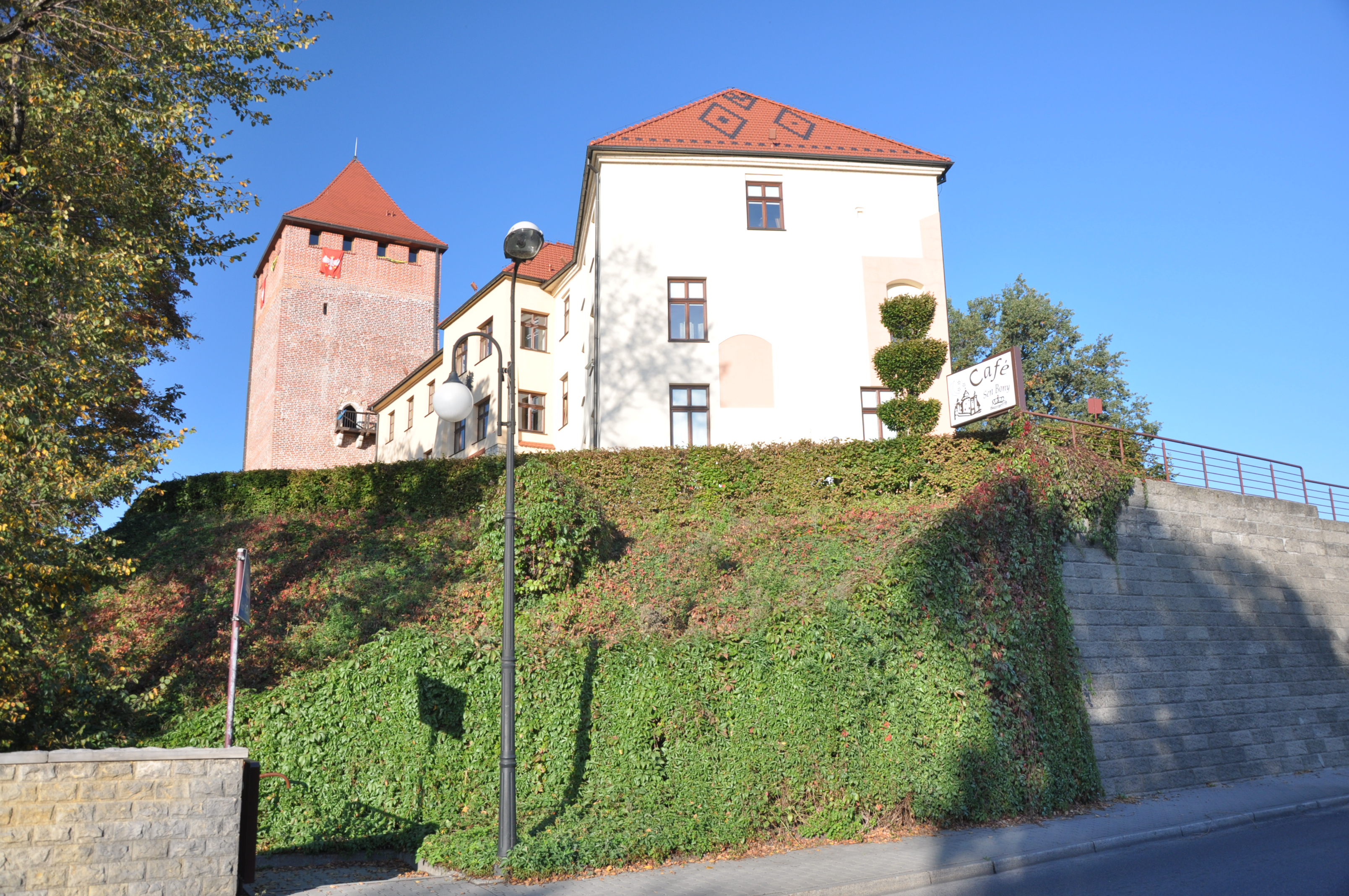 zamek Oświęcim, Oświęcim